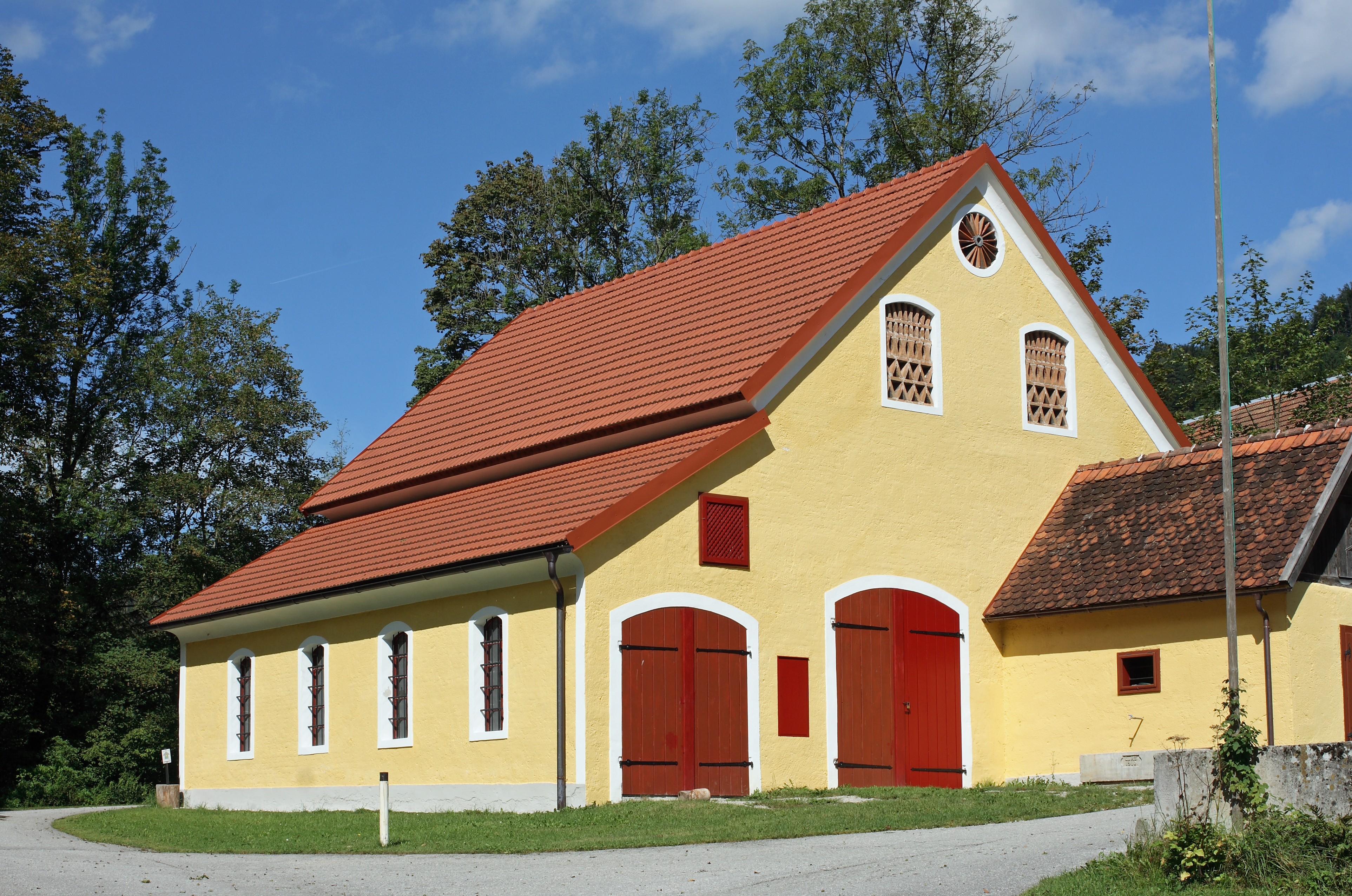 Der Neue Kohlbarren im Freilichtmuseum Schmiedleithen (Grünburg, Oberösterreich)